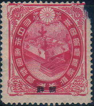 日本が発行した大正天皇の皇太子時代の婚礼記念切手に、朝鮮に設置されていた日本の郵便局用に文字を加刷した切手